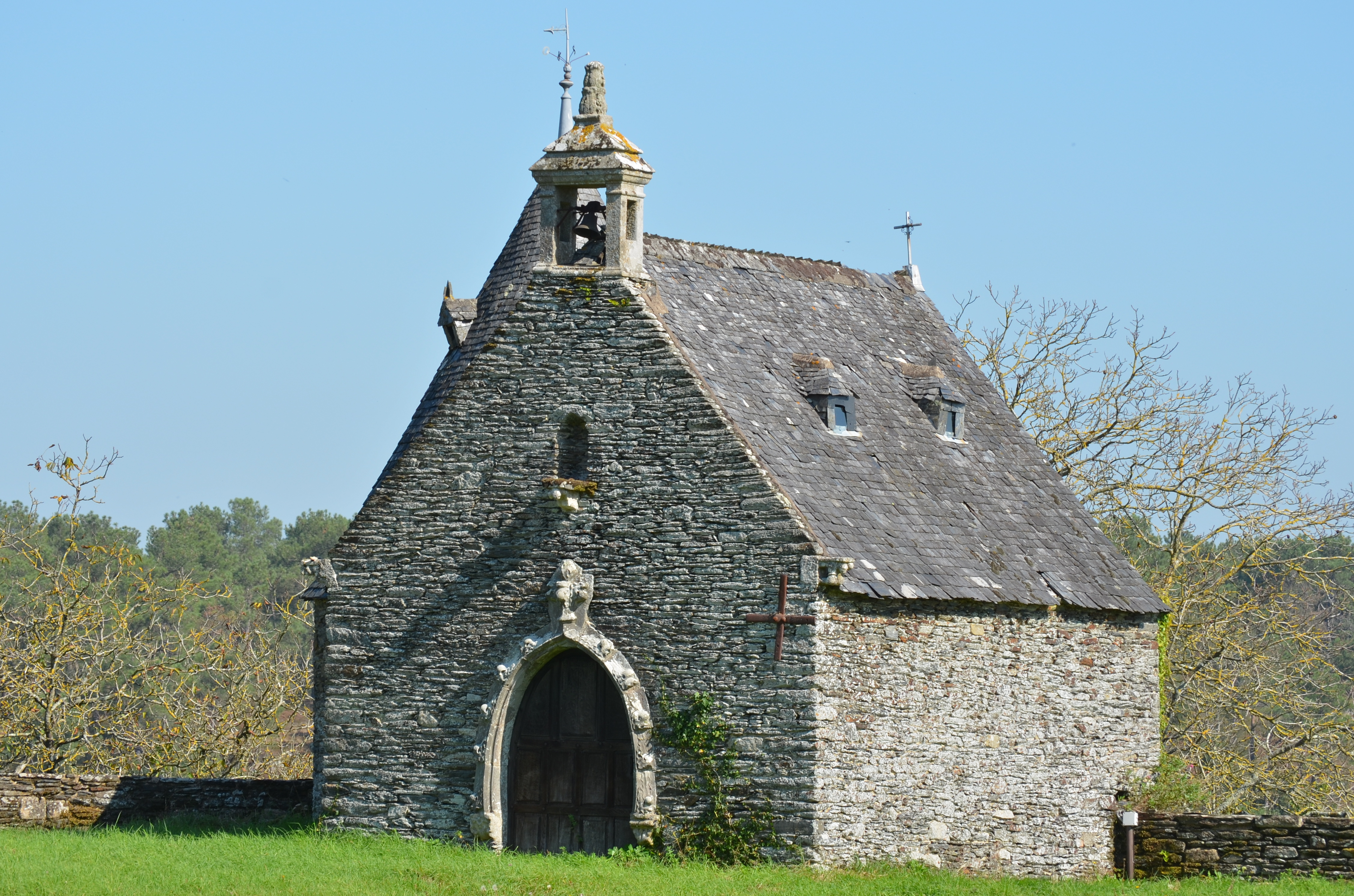 Château de Rochefort-en-Terre (Morbihan) .